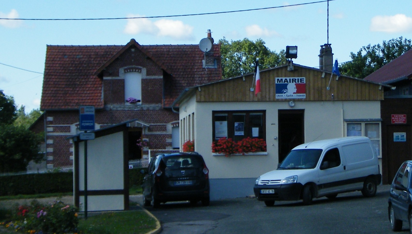 Fallencourt, Seine-Maritime, France, mairie